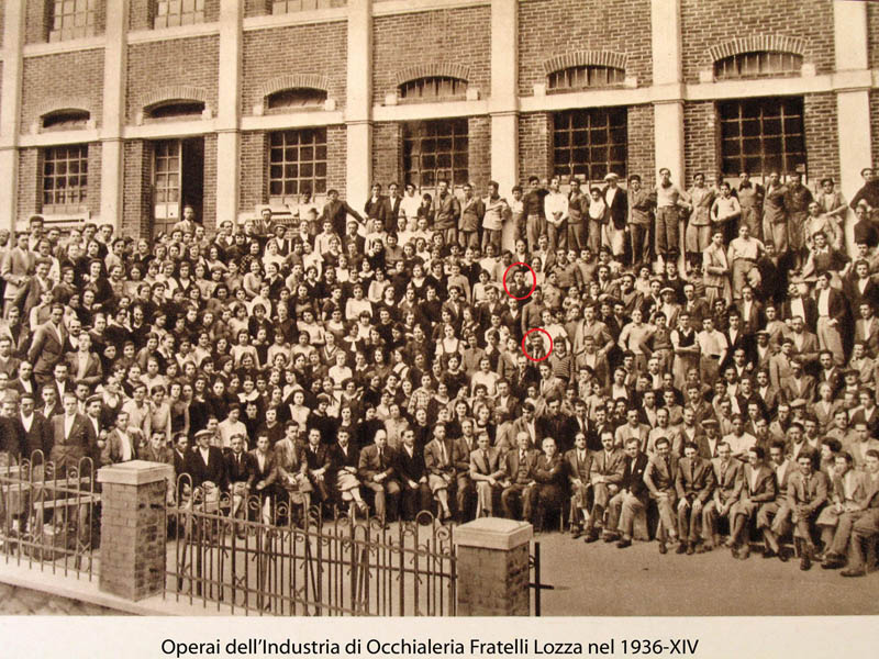 L'industria Fratelli Lozza nel 1936